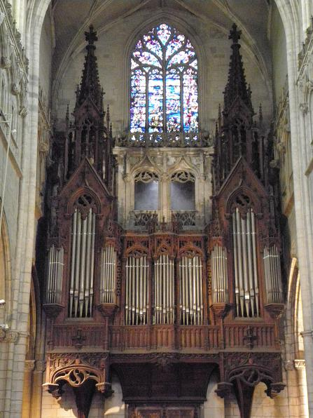 Lyon (69, Rhône, France), église Saint-Nizier, orgue construit en 1886 par Joseph Merklin, restauré en 1913 par MICHEL-MERKLIN-KUHN, puis par Athanase Dunand en 1956. Muet, en attente de restauration depuis le milieu des années 70.